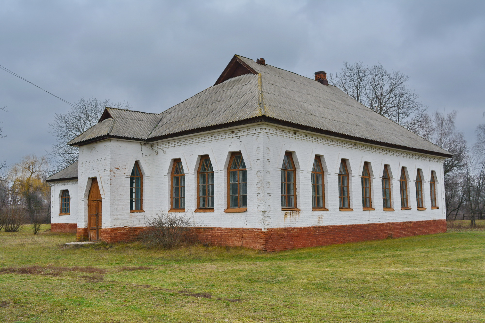 Голінка земська школа